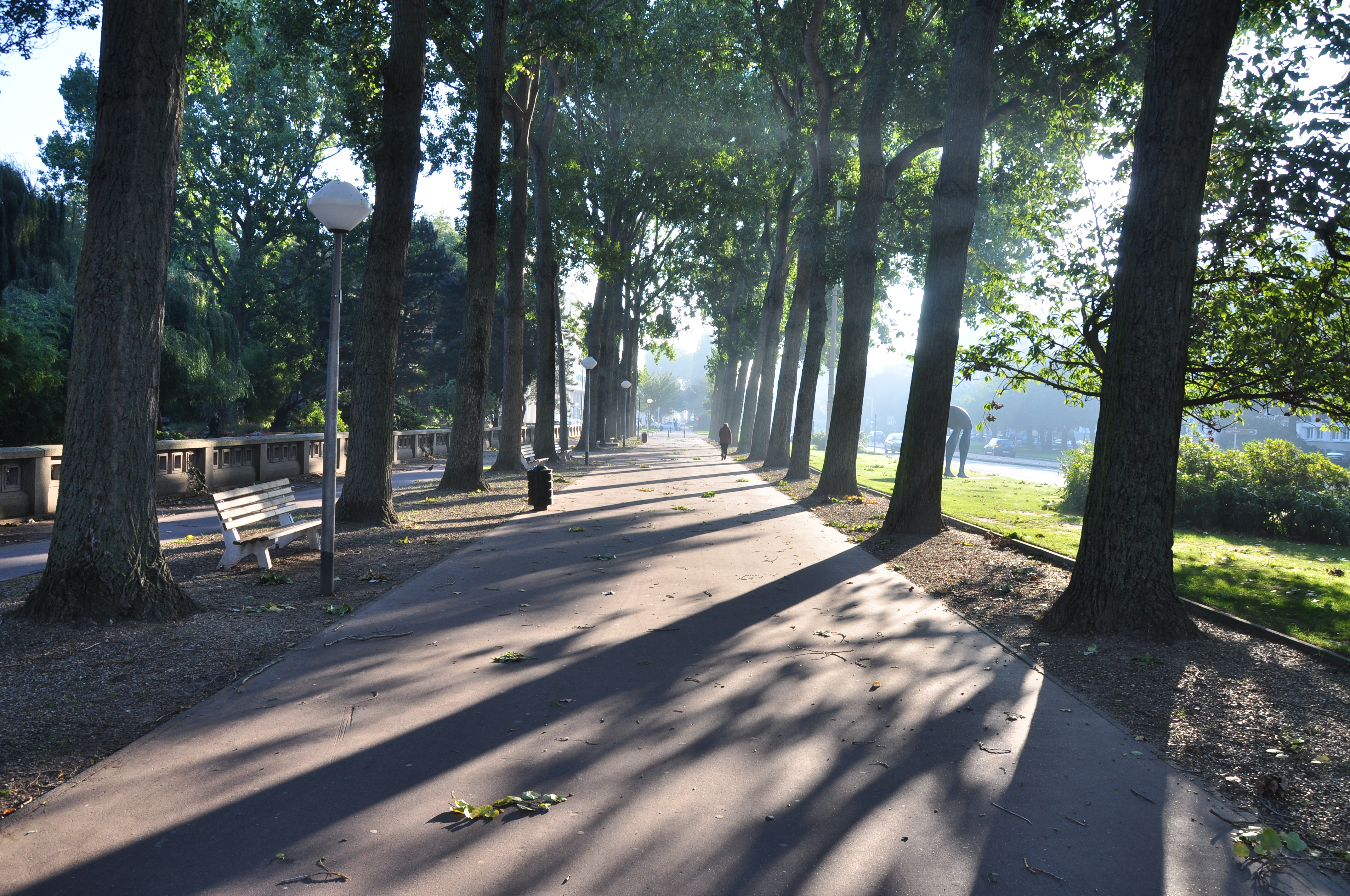 Le Havre (Seine-Maritime) : contre-allée de l'avenue Foch, le long du square Saint-Roch